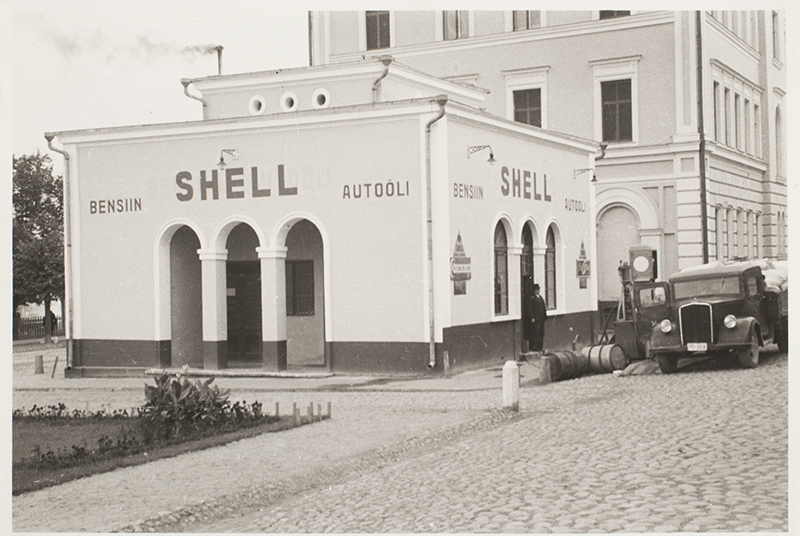 MuuseumikoguFotokoguSeisundmääramata